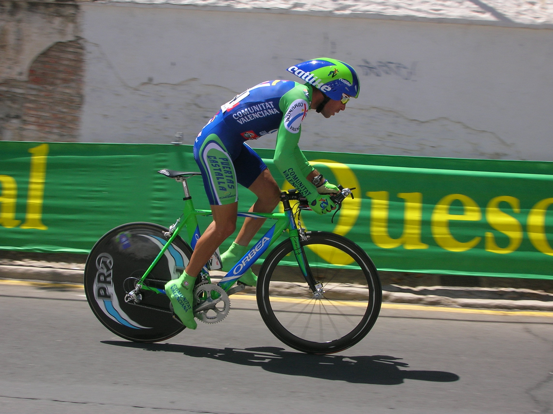 El ciclista granadino Adolfo García Quesada encaminándose hacia la Alhambra durante el prólogo de la Vuelta Ciclista a España 2005, en Granada.